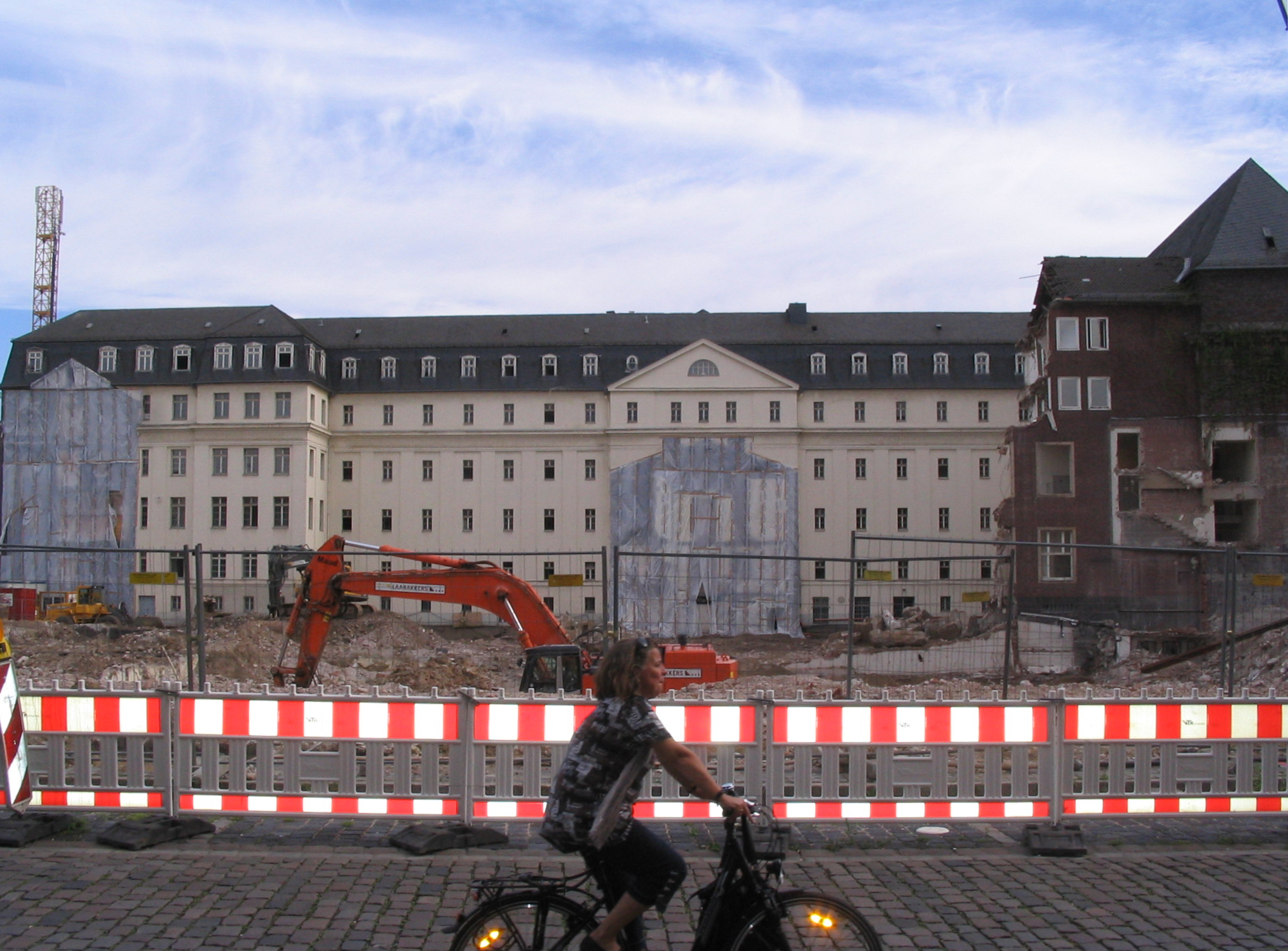 Düsseldorf, Ratinger Straße. Blick auf die Rückseite des ehemaligen Landgerichts nach Abriss des hinteren Gebäudekomplexes.